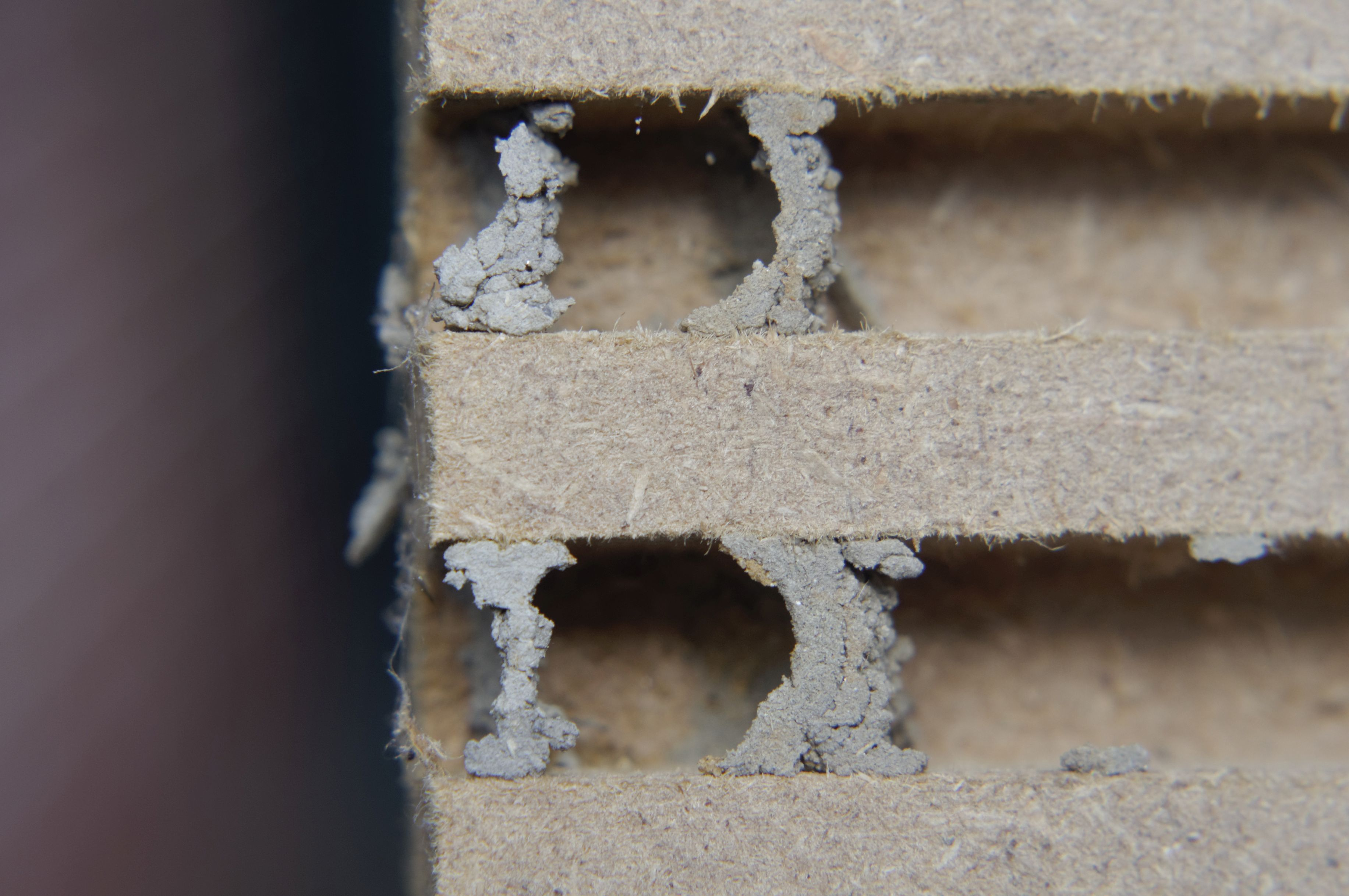 Bilder vom Insektenhotel